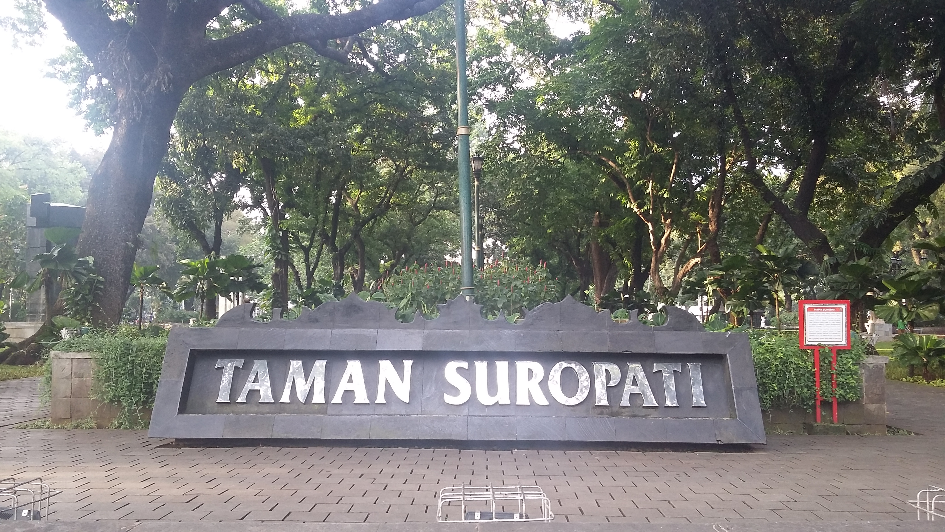 Taman Suropati adalah taman yang terletak di kawasan Menteng,Jakarta. Taman ini berada tepat di antara pertemuan tiga jalan utama yaitu Menteng Boulevard (Jln. Teuku Umar), Orange Boulevard (Jln. Diponegoro) dan Nassau Boulevard (Jln. Imam Bonjol).